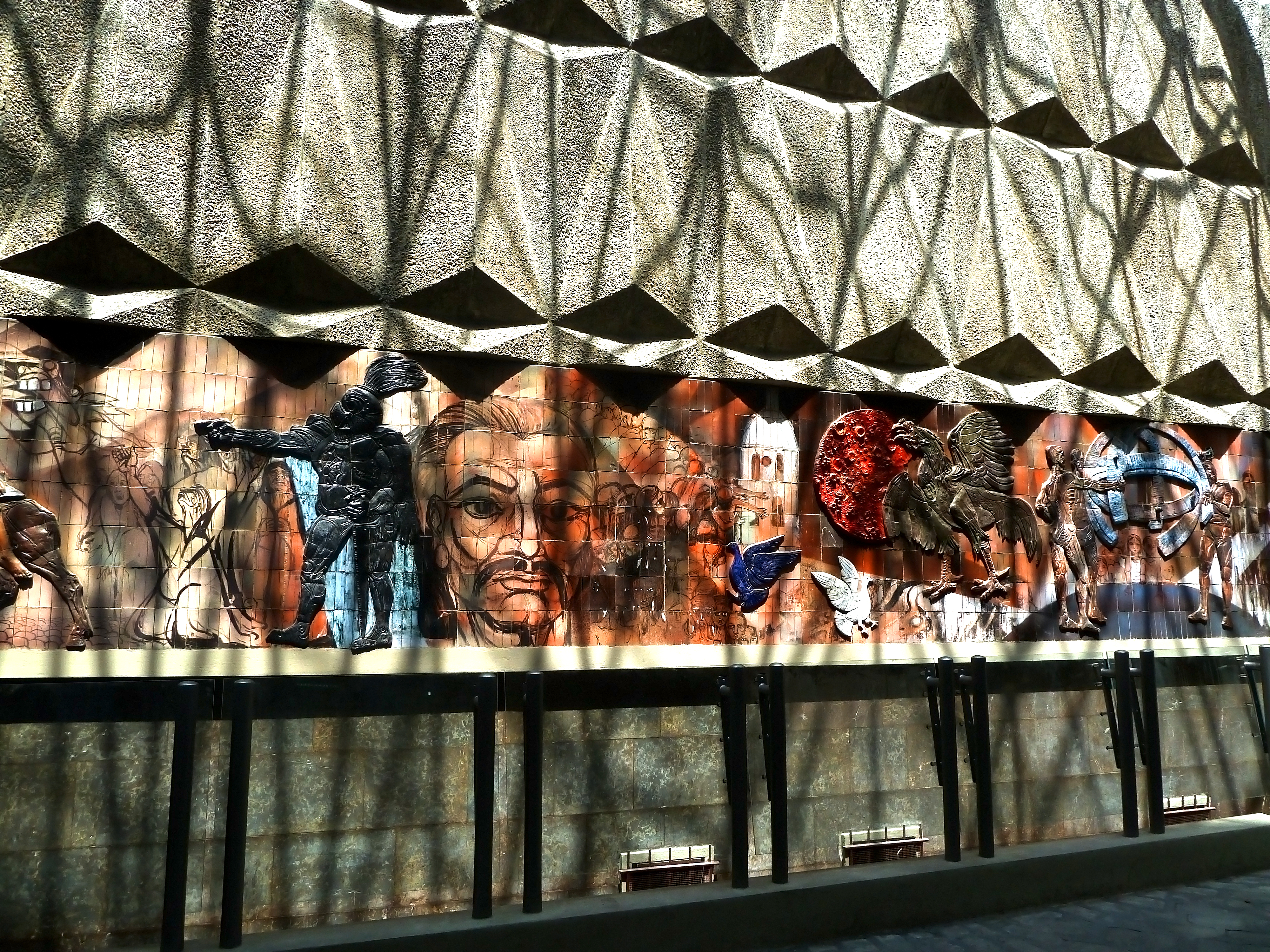 Casa de la Cultura Franz Tamayo This medium shows the protected monument with the number L/00-065 in Bolivia.